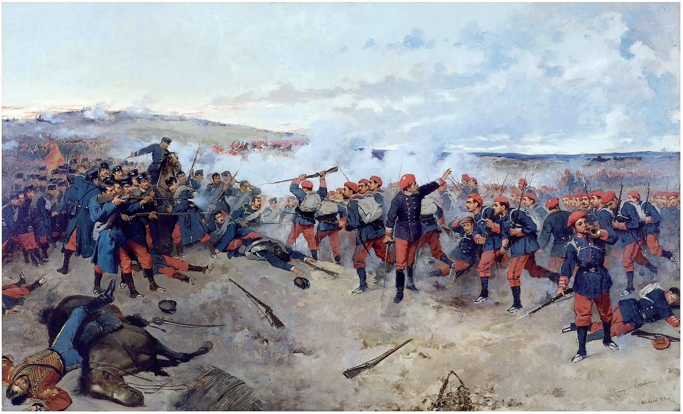 Tercera Guerra Carlista. Batalla de Lacar por Enrique Estevan y Vicente